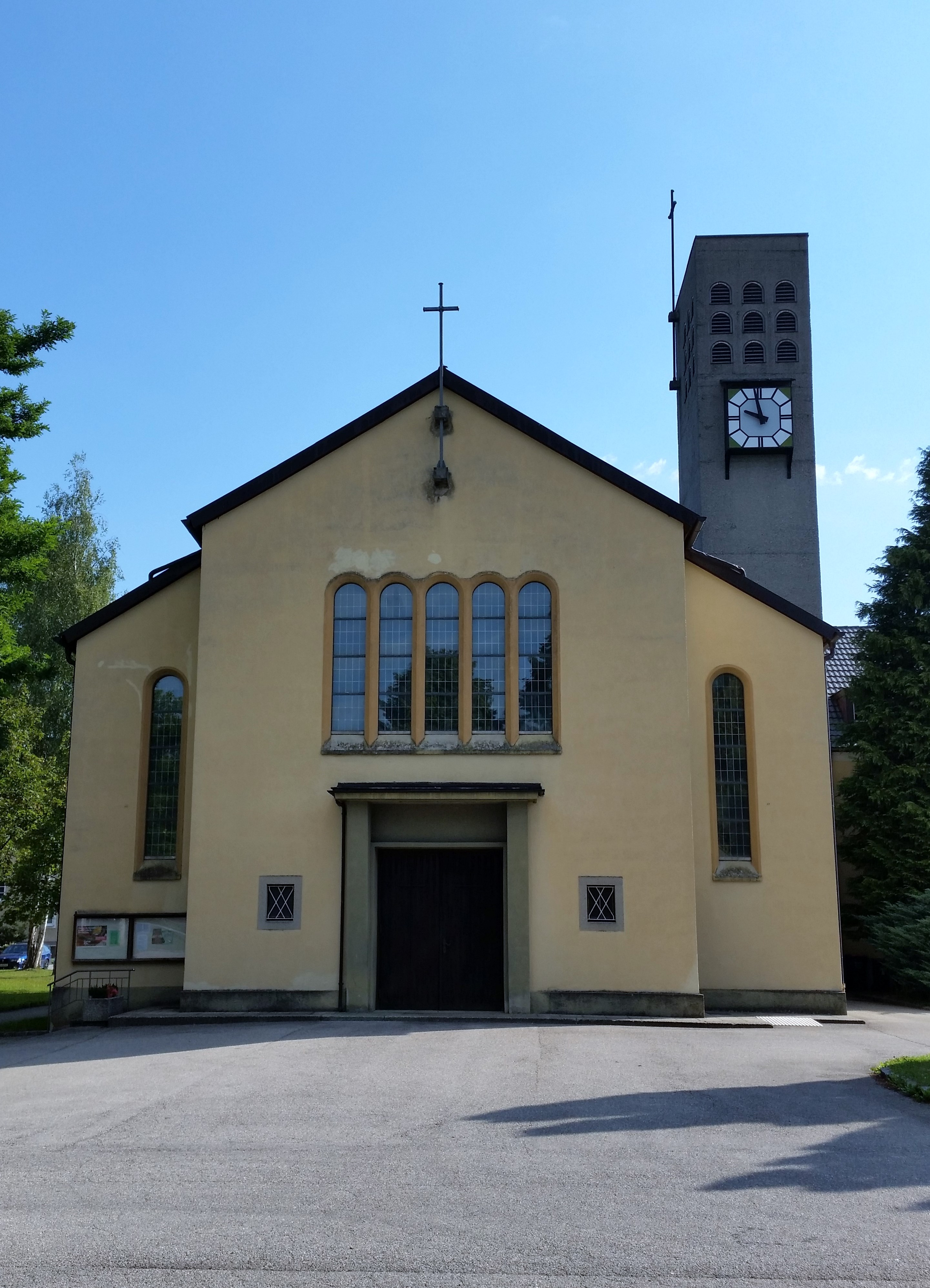 Kath. Pfarrkirche Hl. Familie